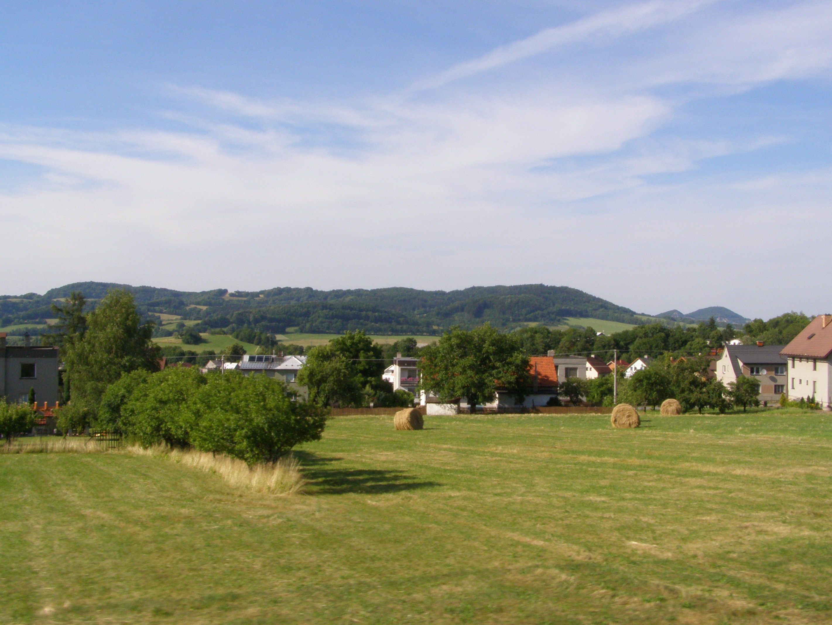 Mořkov, v pozadí Libotínské vrchy